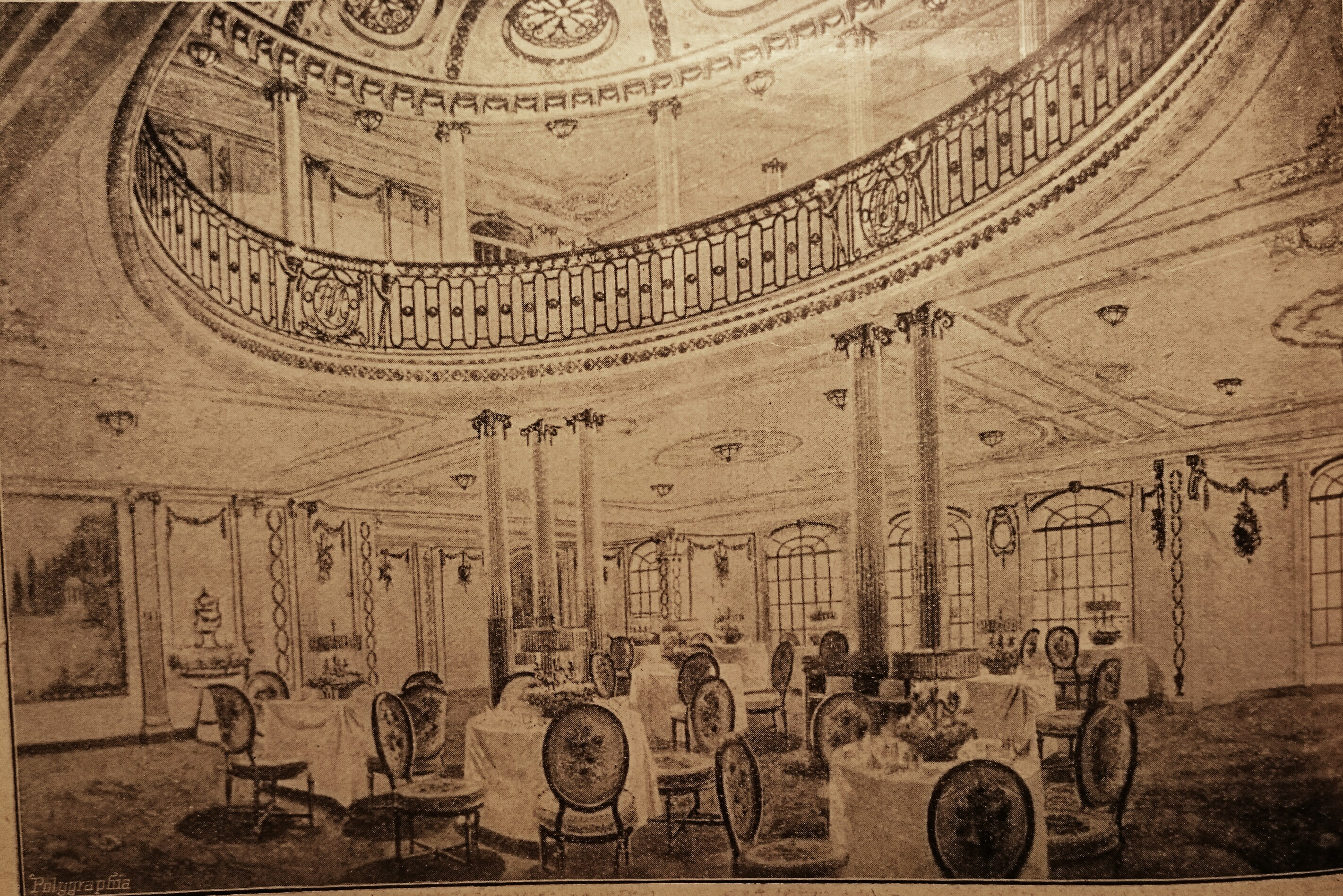 Interiery z parníku "Imperator". Jídelna I. třídy.